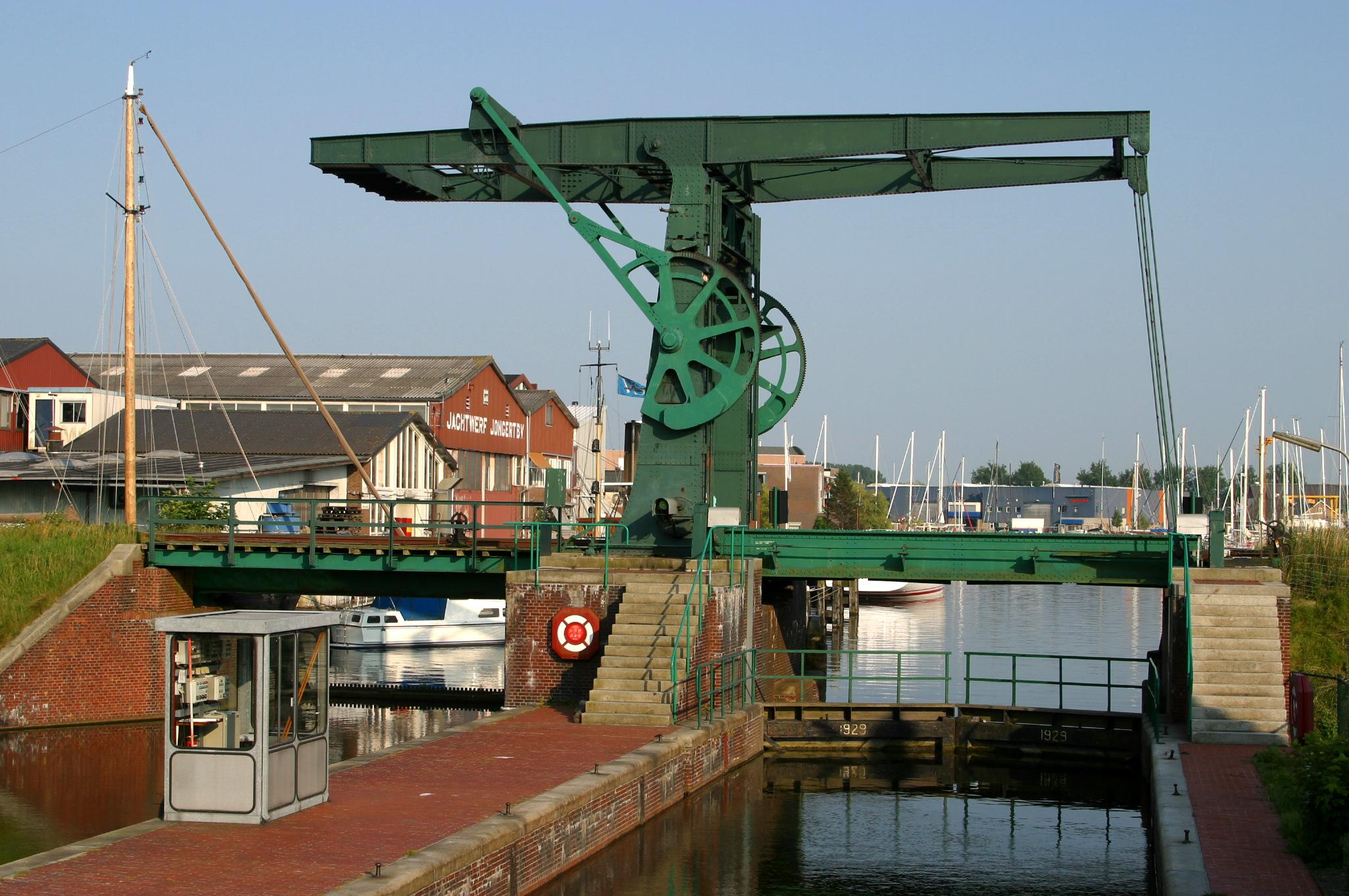 De spoorbrug over de sluis te Medemblik.